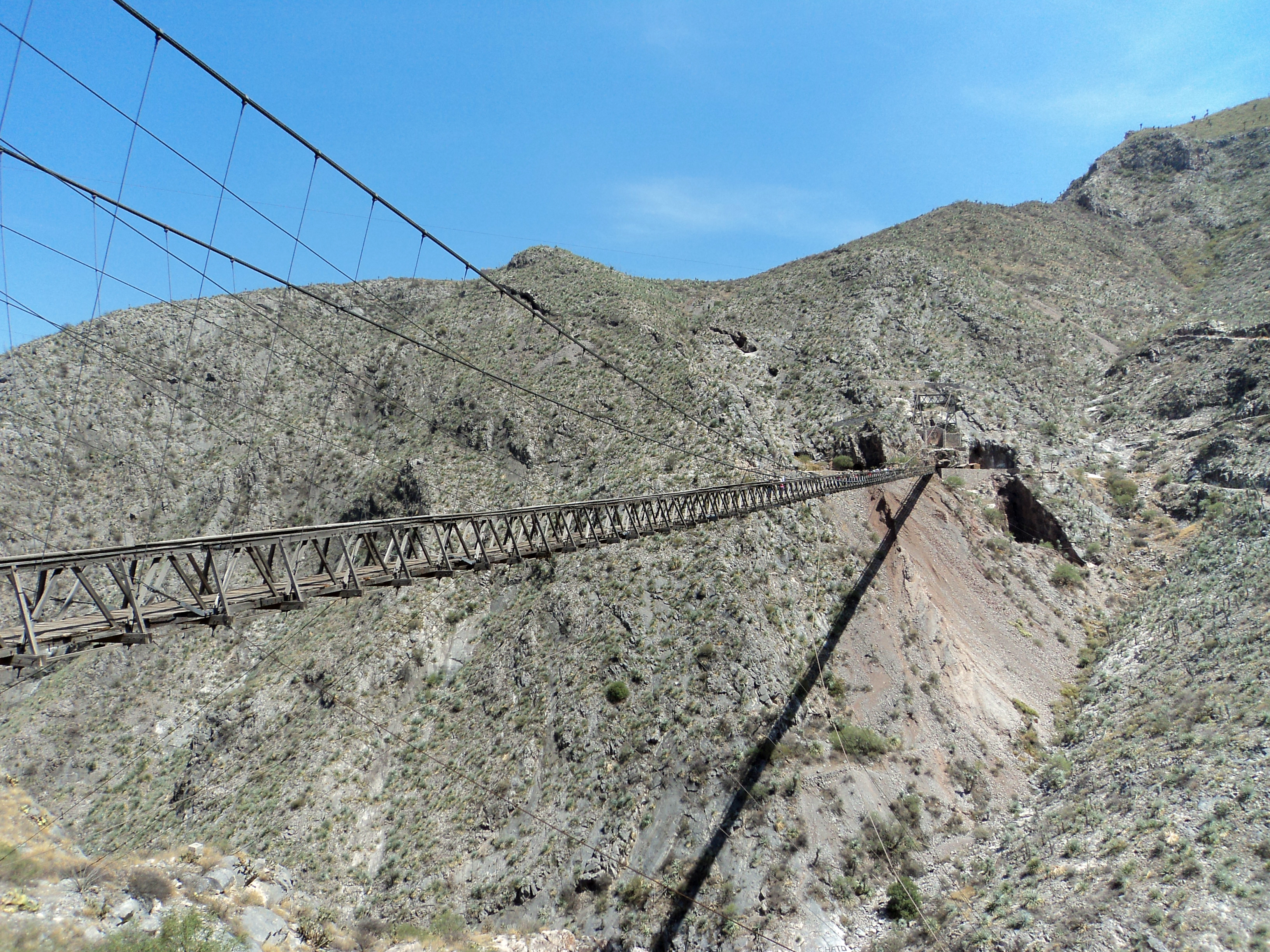 Una obra de ingeniería del siglo XIX, el puente de la Ojuela ubicado en la región denominada como el Bolsón de Mapimí perteneciente al estado de Durango.